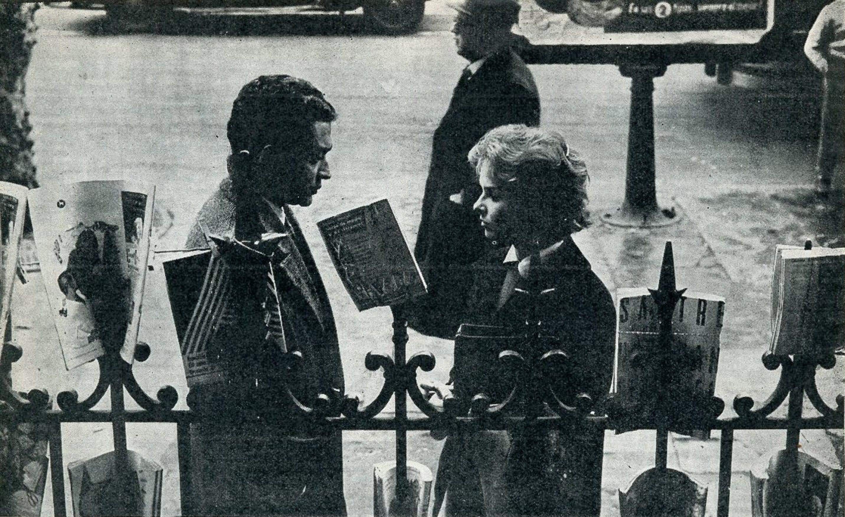 Luis Medina Castro y María Vaner en Tres veces Ana (película) de David José Kohon.